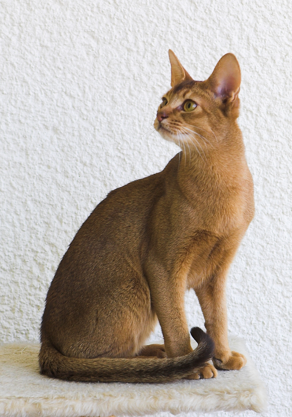 Quiomme's Gustav (Abessinierkater chocolate)